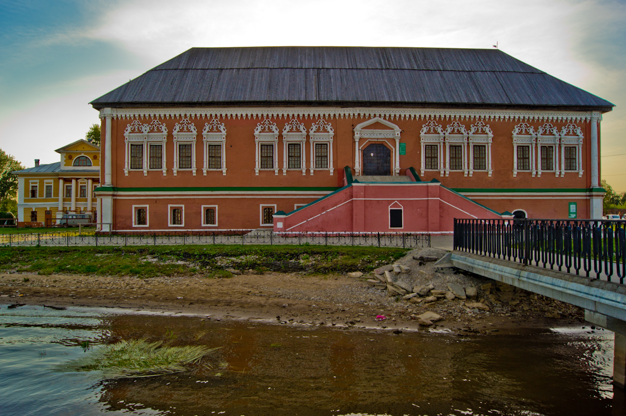 Главный дом (Пермский край, Усолье, республиканская улица, 29)